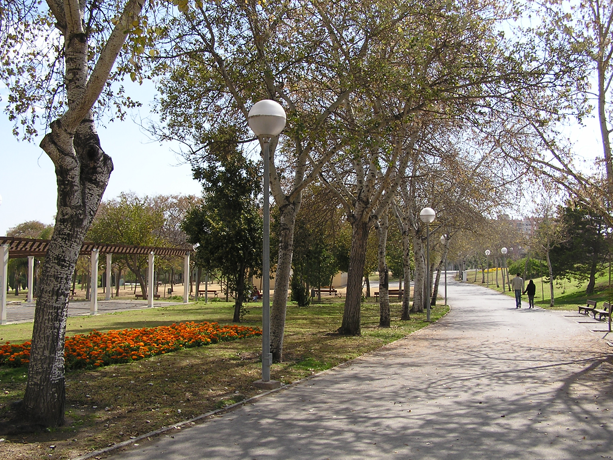 Parque Lo Morant, Alicante, Spain. See also Parques y zonas de esparcimiento en Alicante. See also Parque Lo Morant, Ayuntamiento de Alicante.